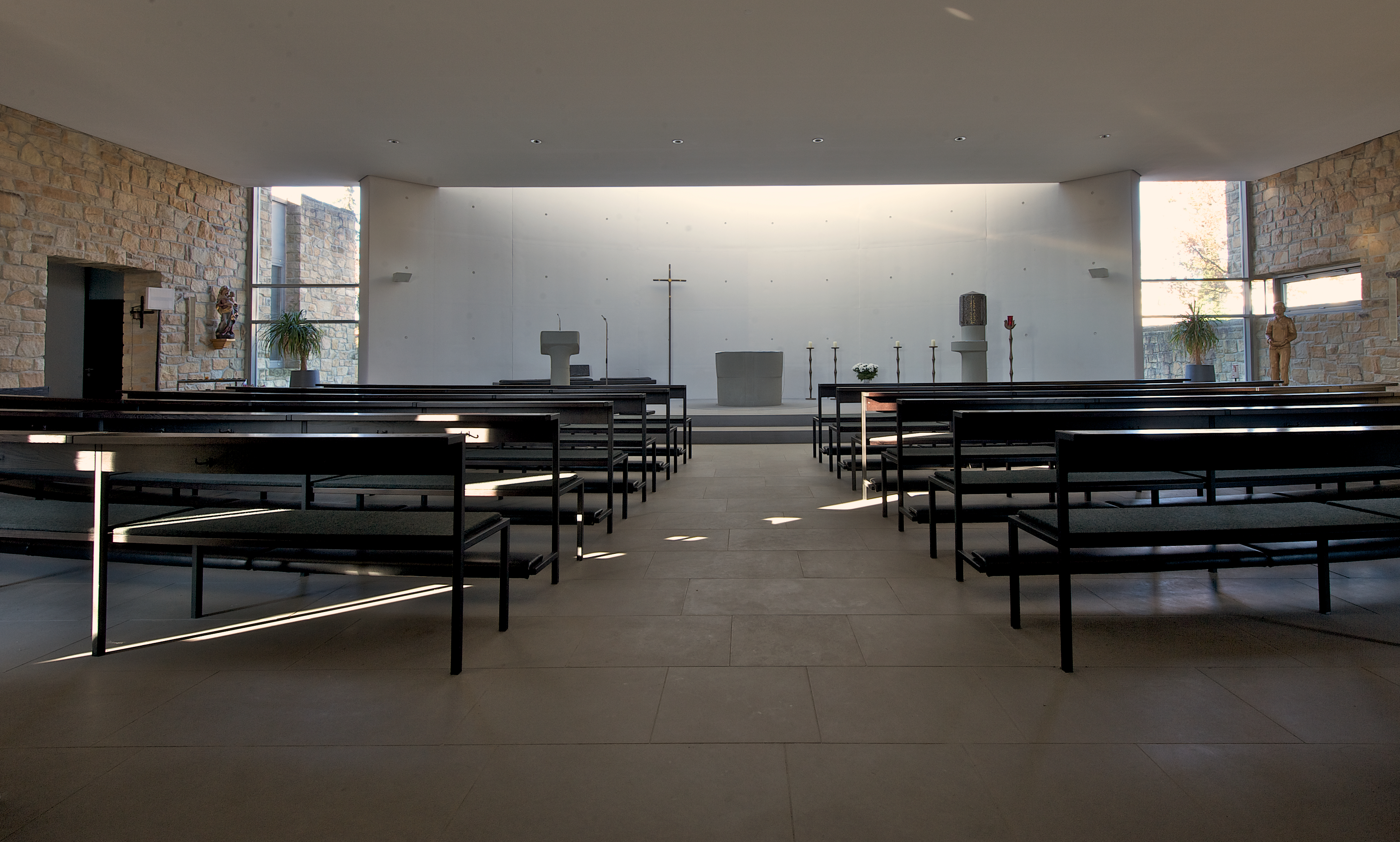 Innenraum der ehemaligen Maximilian-Kolbe-Kirche in Bad Lippspringe bei Paderborn